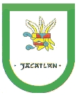 Escudo del municipio de Zacatlán